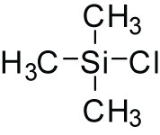 trimethylsilyl chloride